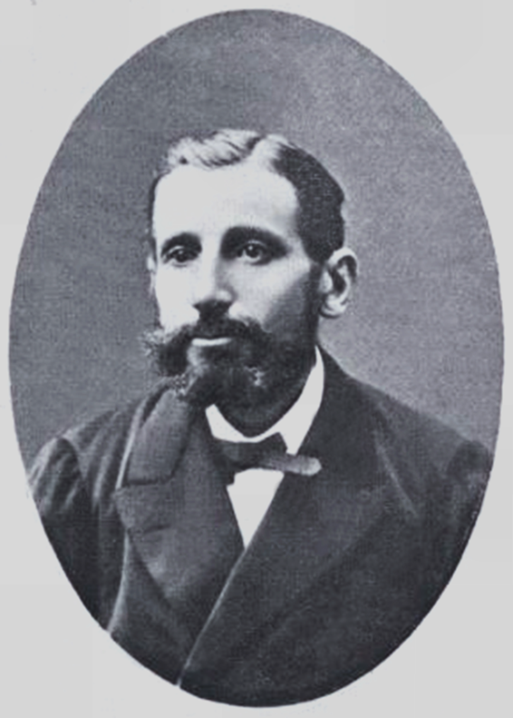 Léon Gaston Genevier nach 1870, französischer Mykologe